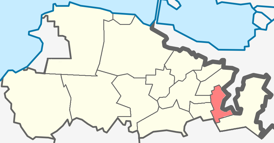 Лаголовское сельское поселение Ломоносовского района Ленинградской области.